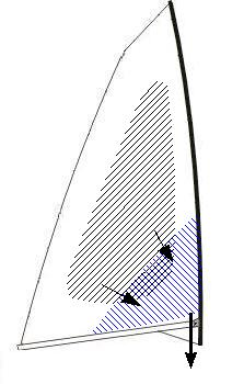 Illustration av hur seglets buk flyttas fram då seglets cunningham sträcks. Kruosio har modifierat sv::Bild:Ejolle.JPG för framställa denna bild.